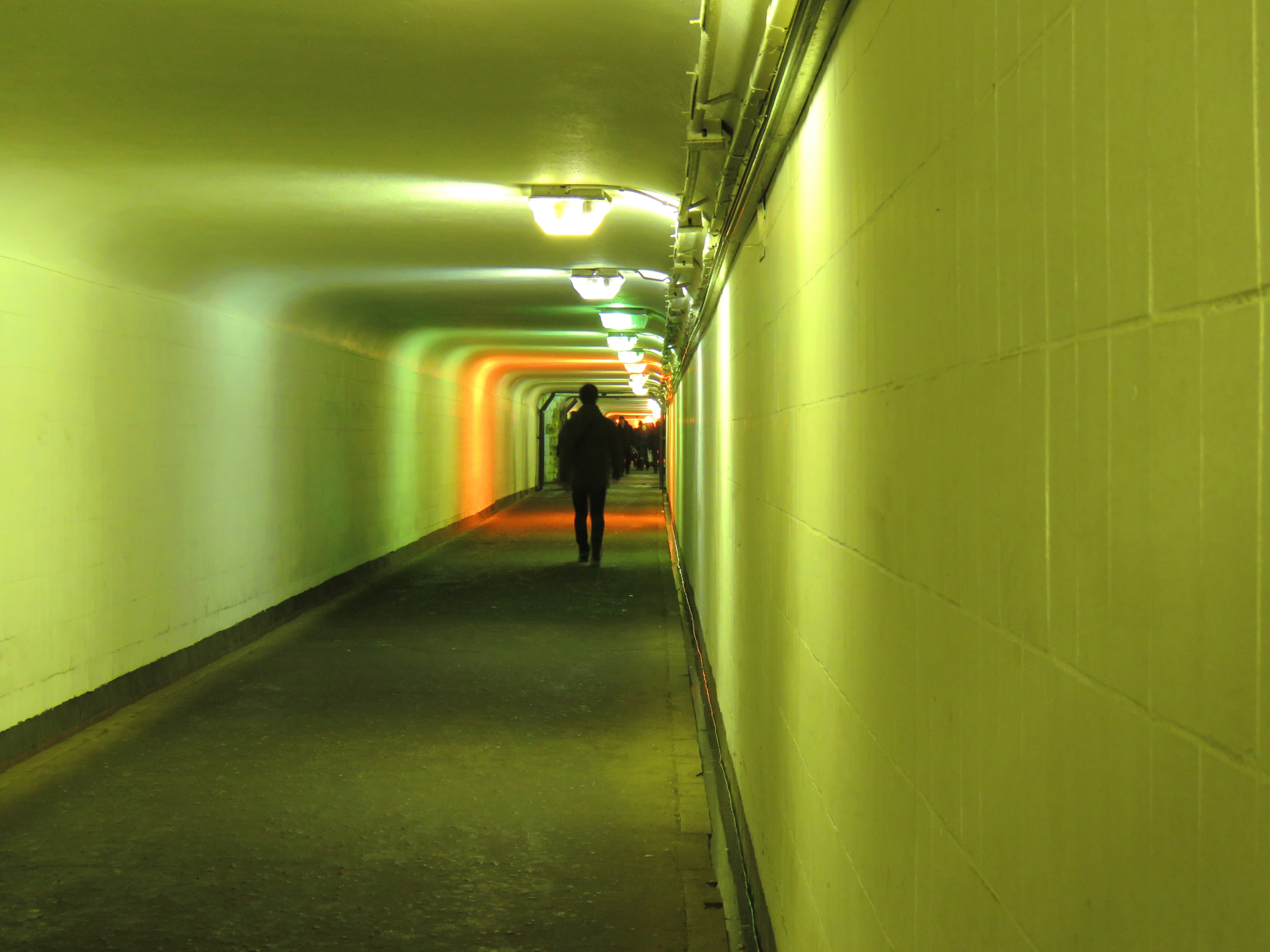 Подземный переход у станции метро «Выборгская» (Санкт-Петербург)